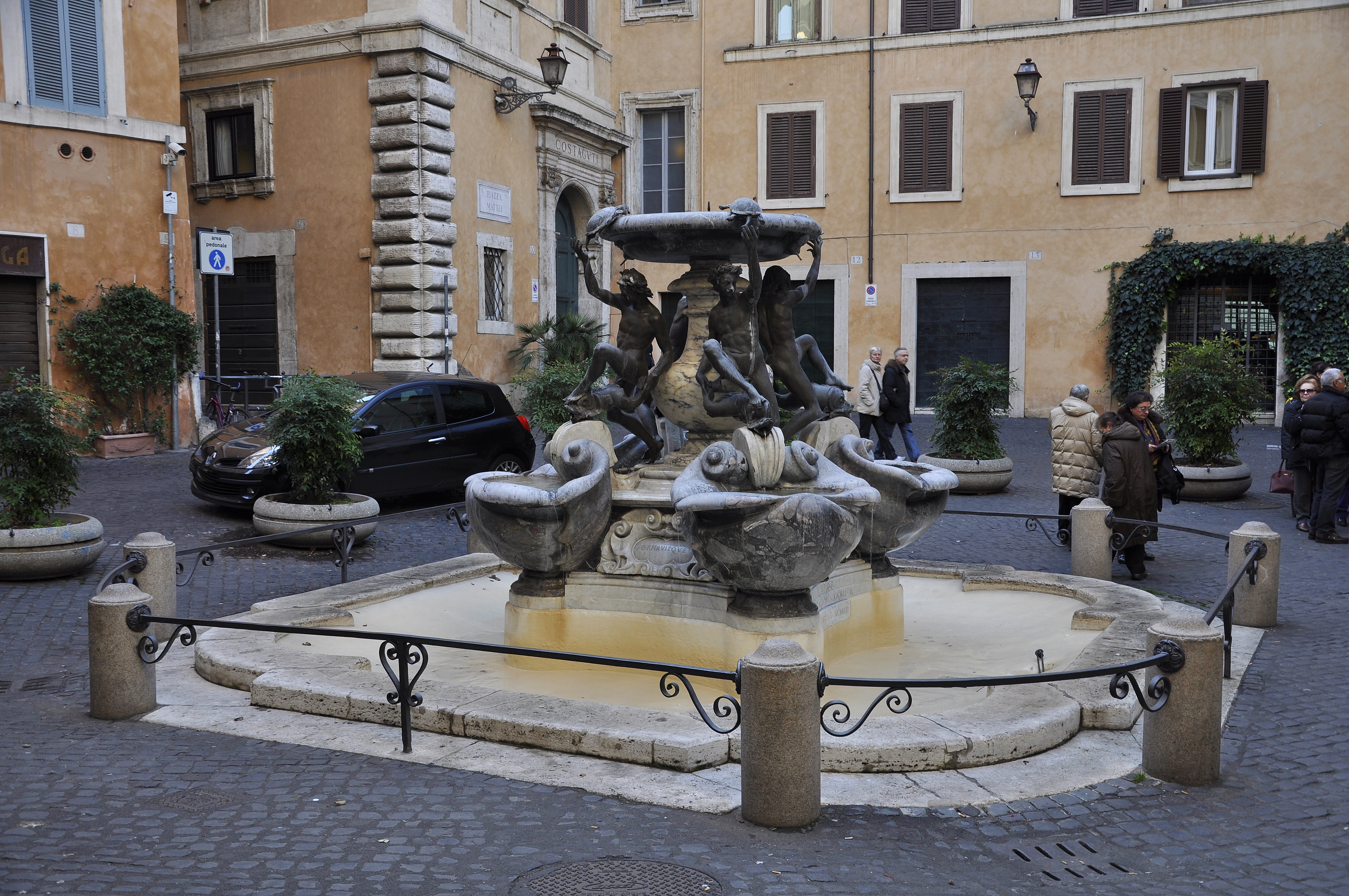 De Fontana delle Tartarughe in Rome